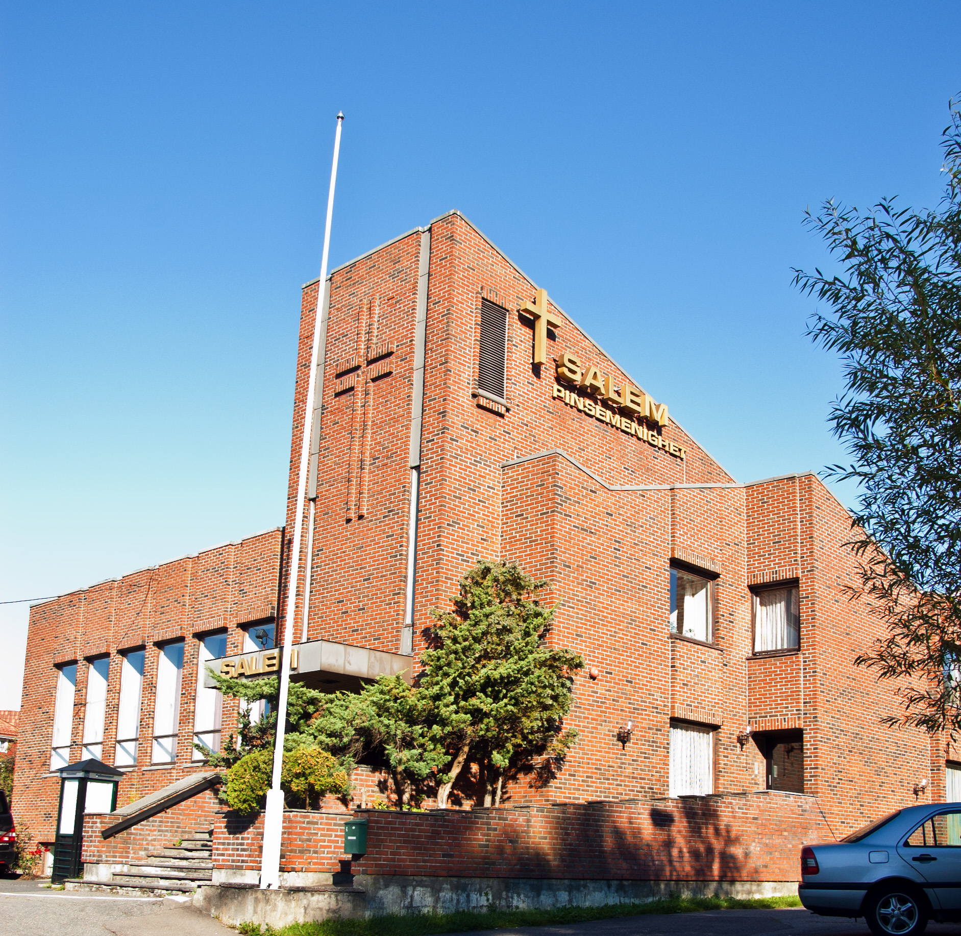 Salem Pinsemenighet i Sandefjord